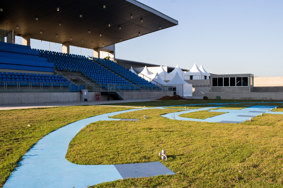 Vista parziale del Centro Nacional de Tiro di Rio de Janeiro